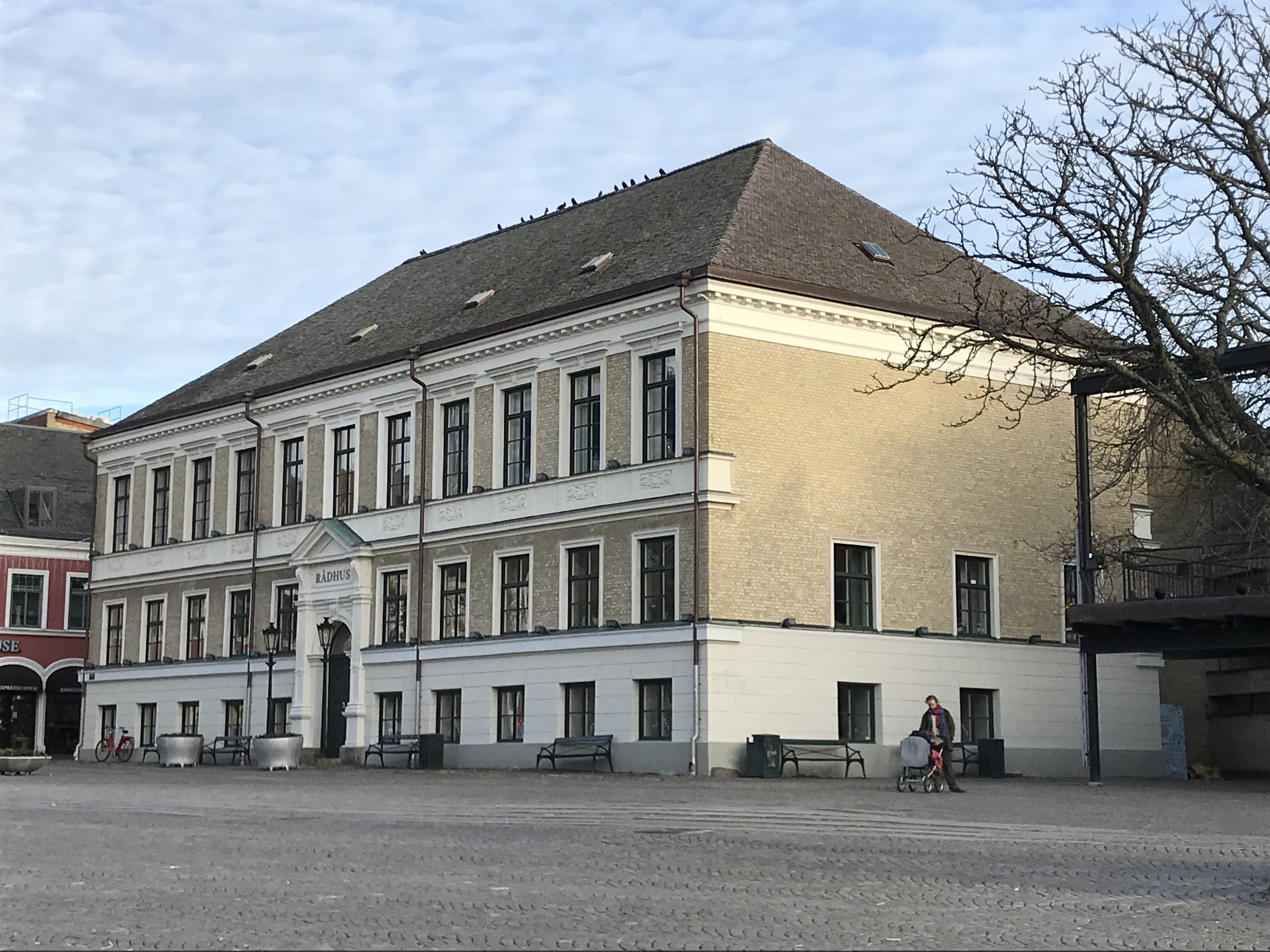 Rådhuset vid Stortorget i Lund, den 3 januari, 2019